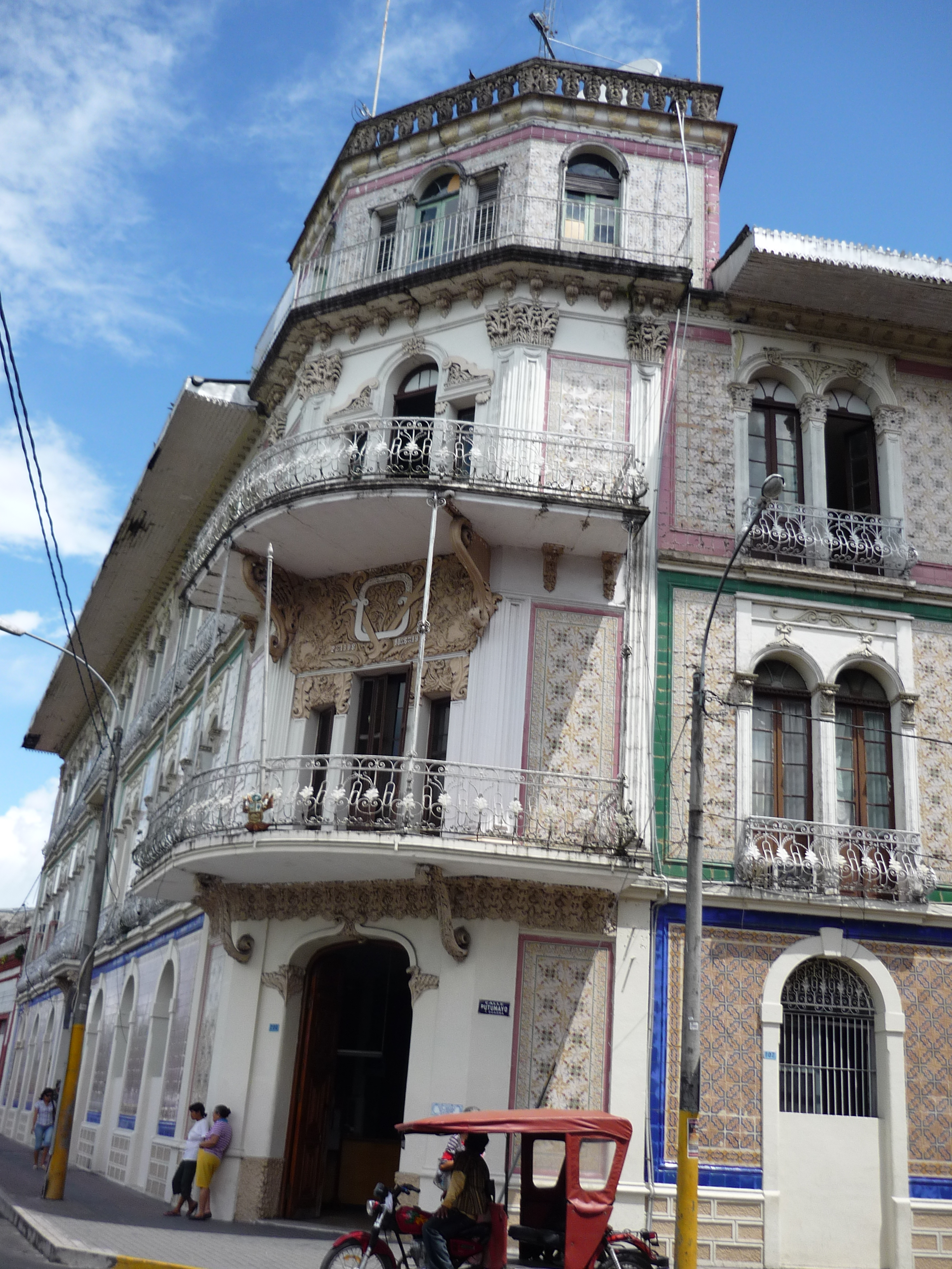 Fachada de el ex-hotel Palace de Iquitos